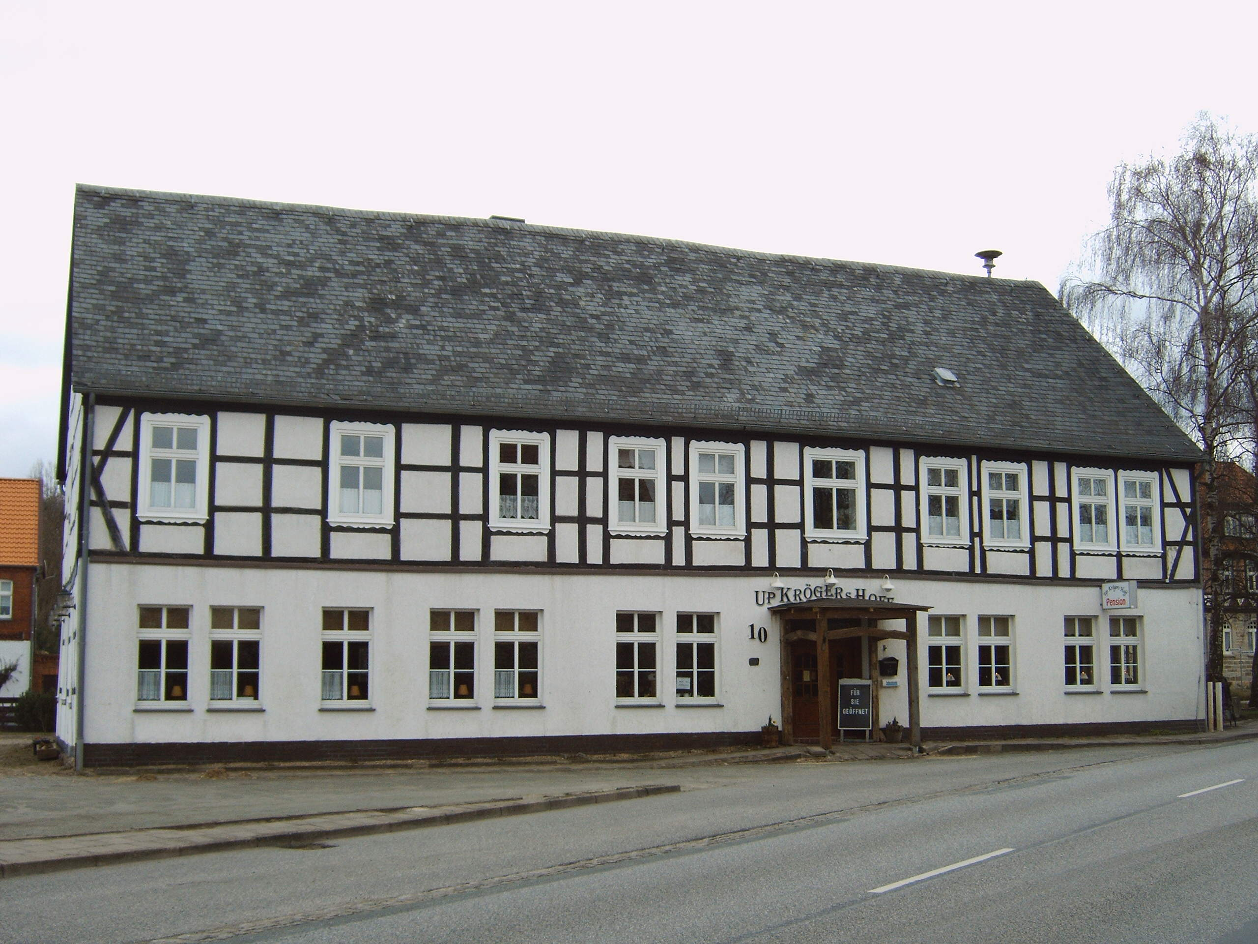 Fachwerkhaus in Mahlsdorf (Altmark), Deutschland Bild aufgenommen am: 6.4.2006 Urheber: Olaf Meister